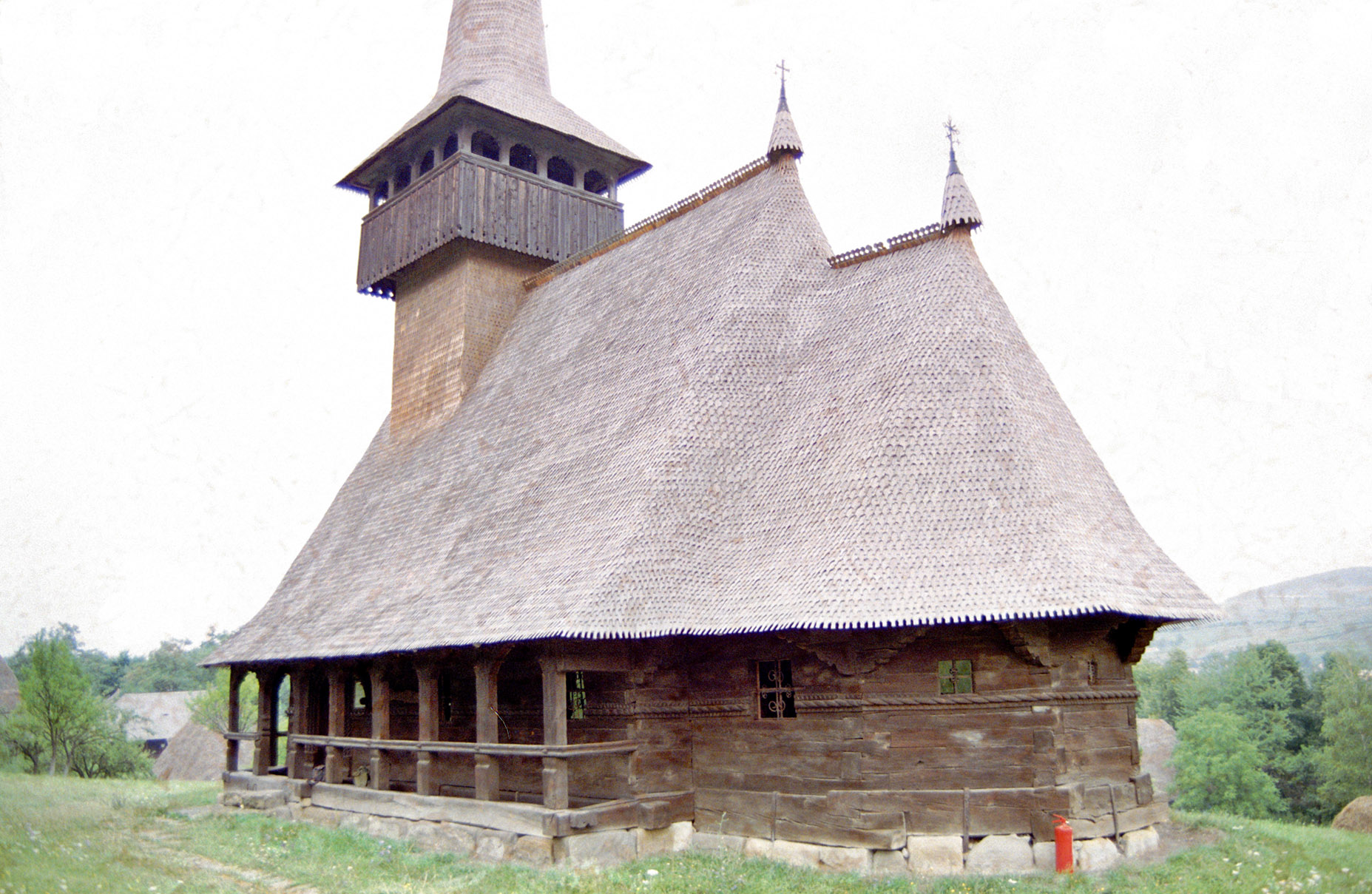 Biserica din Cizer, Sălaj, în Parcul Etnografic "Romulus Vuia" din Cluj Napoca. Foto: Alexandru Baboş, 2001. Categorie:Biserici de lemn din Sălaj (imagini)